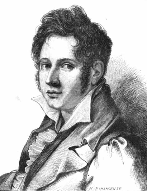 Portrait of Adam Gottlob Oehlenschläger as a young man. Engraving by Hans Peter Hansen after Ernst Ludwig Riepenhausen.